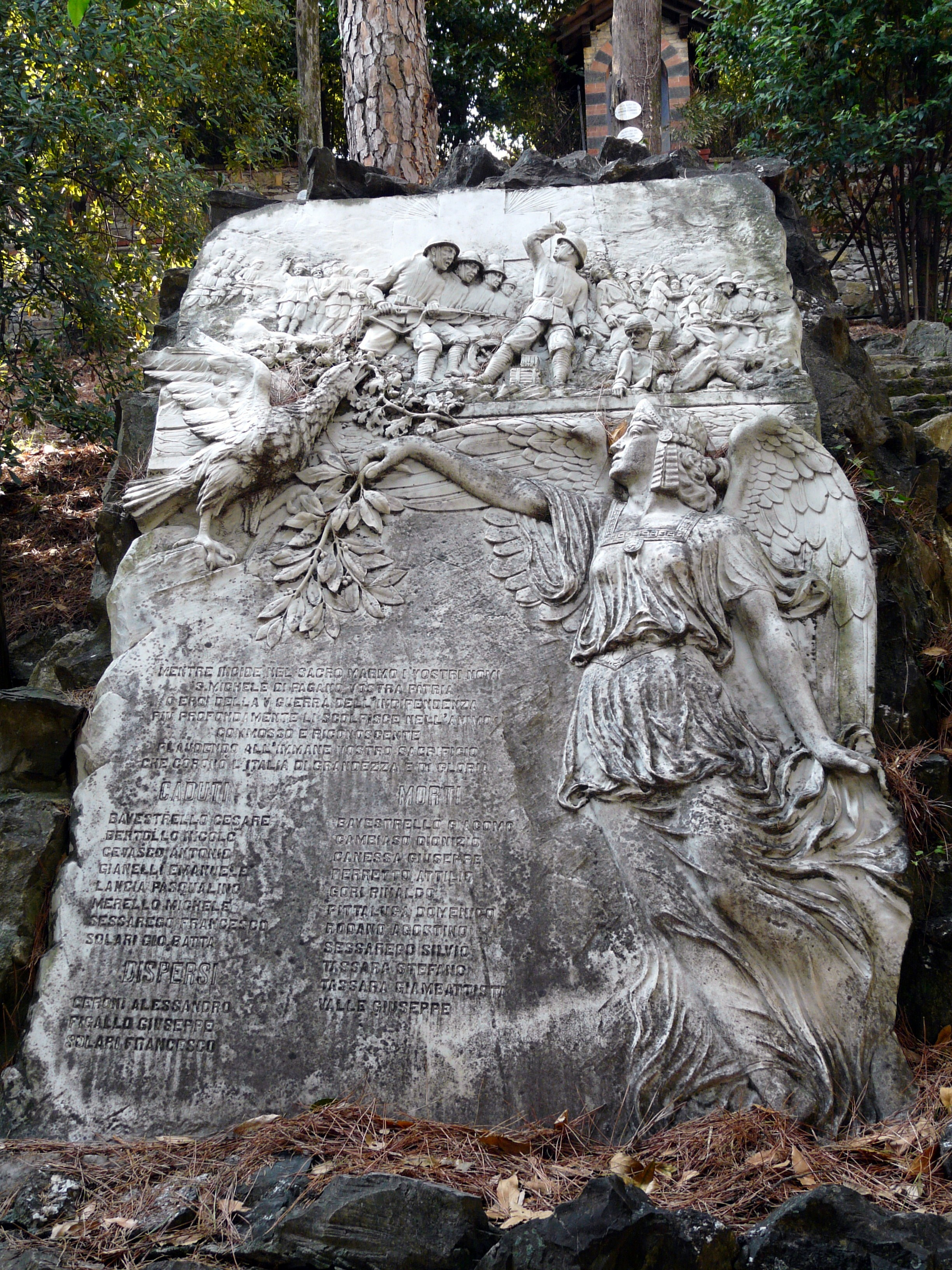 Lapide ai caduti, San Michele di Pagana, Rapallo, Liguria, Italia